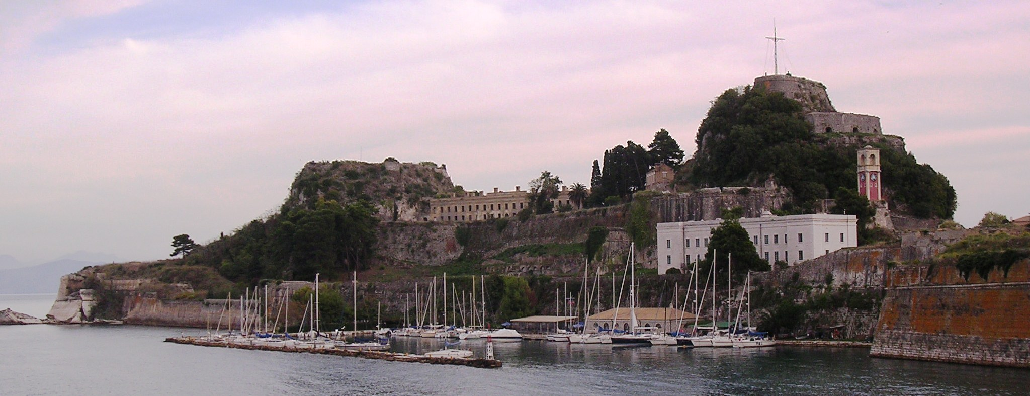 Παλιό Φρούριο Κέρκυρας από τον Κήπο του Λαού.